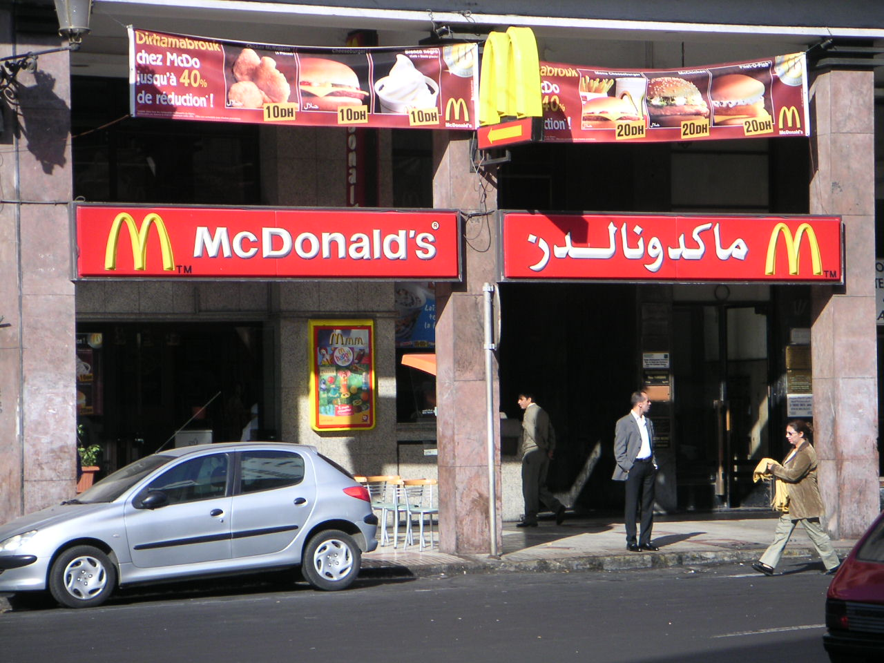 McDonalds, Casablanca. Photo: Soman